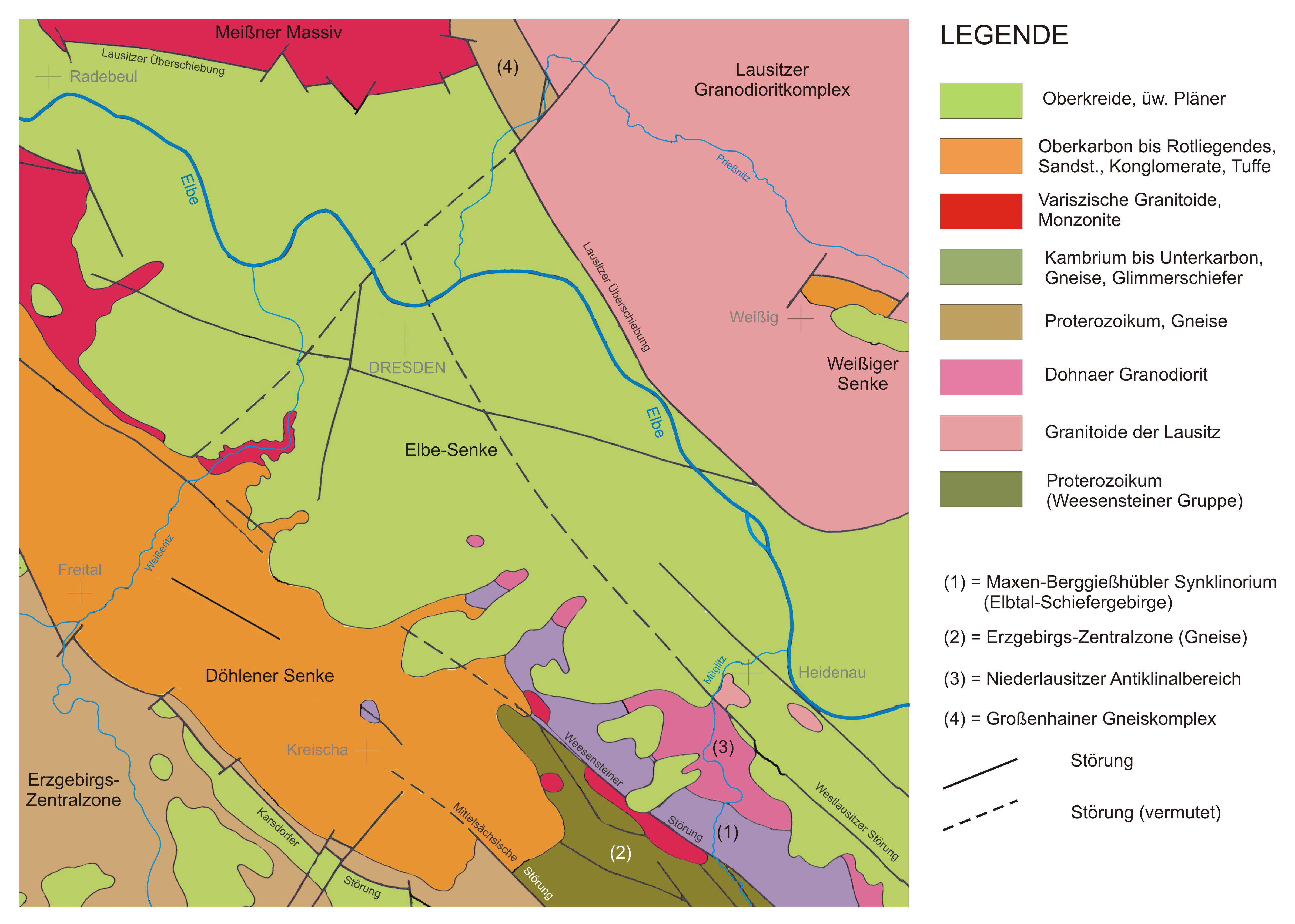 Geologische Karte von Dresden und Umgebung ohne Känozoikum. Quelle: Alexowsky, W., Schneider, J. W. u.a.: Erläuterungen zur Geologischen Karte des Freistaates Sachsen 1 : 25.000; Blatt 4948 Dresden, Sächsisches Landesamt für Umwelt, Geologie und Landwirtschaft, Freiberg 2001 (Seite 8).